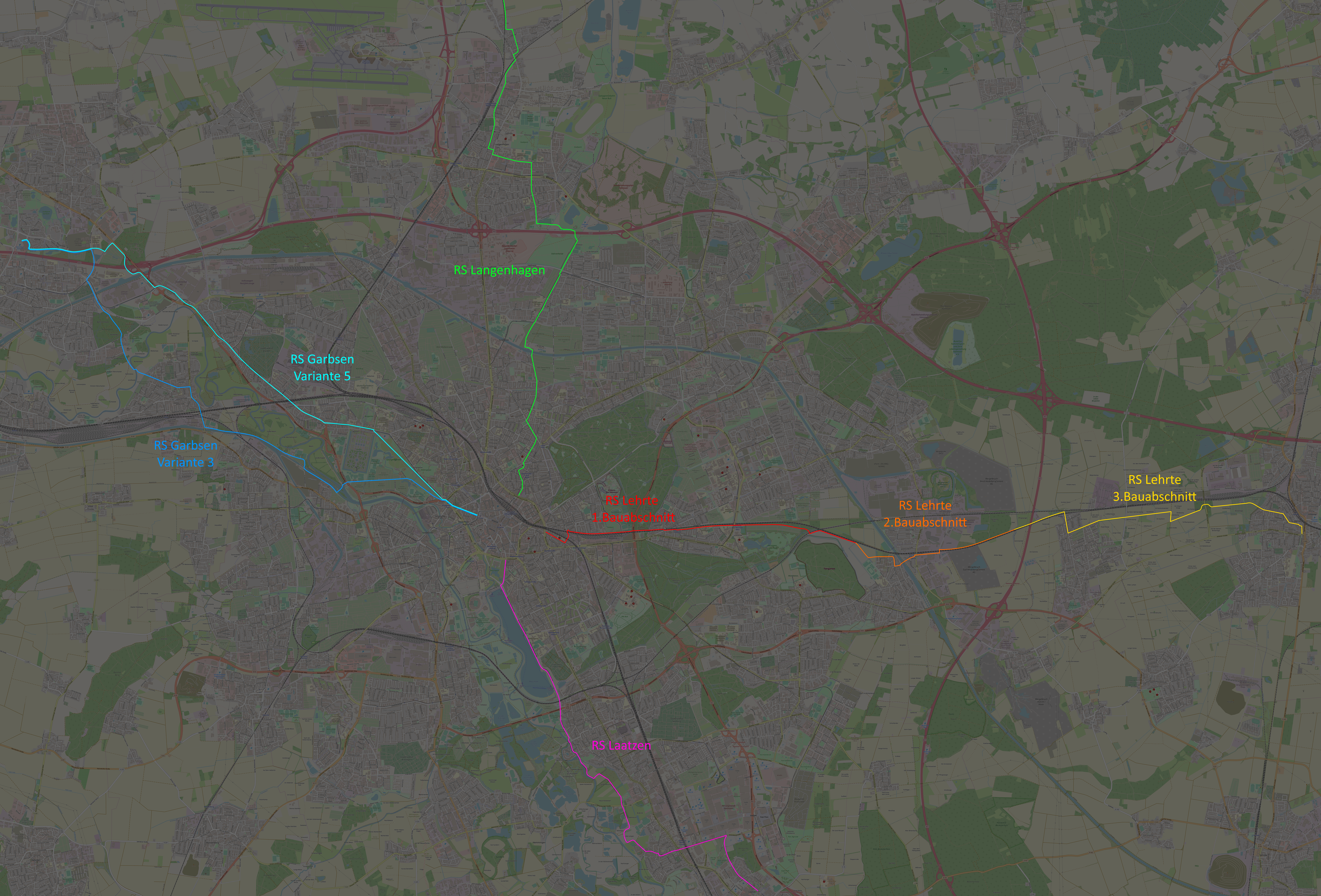 Geplante und realisierte Radschnellwege in und um Hannover, Stand März 2019